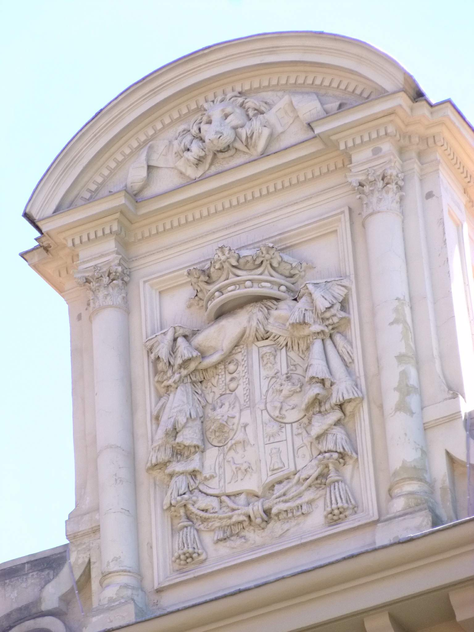 Museo Cerralbo (Madrid)